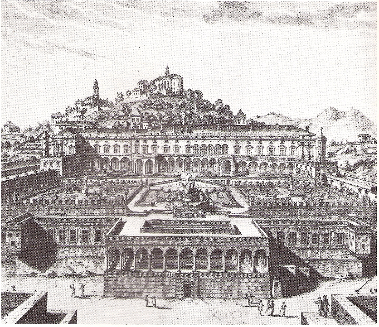 Raffigurazione del probabile Palazzo del Principe di Genova nel XVI secolo voluto da Andrea Doria.